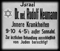 Einschränkung wohnungswirtschaftlicher Tätigkeiten für jüdische Ärzte durch das NS-Regime hier für Dr. med. Israel Rudolf Neumann aus Berlin